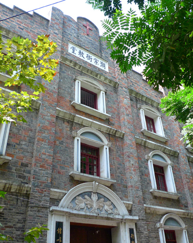 潮宗街教堂